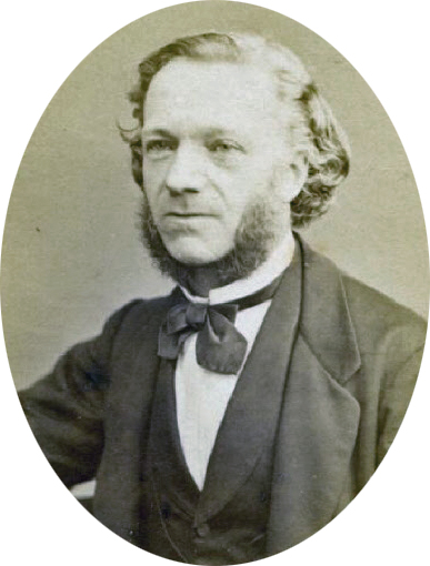 Portret van de remonstrantse predikant Jan Hendrik Maronier